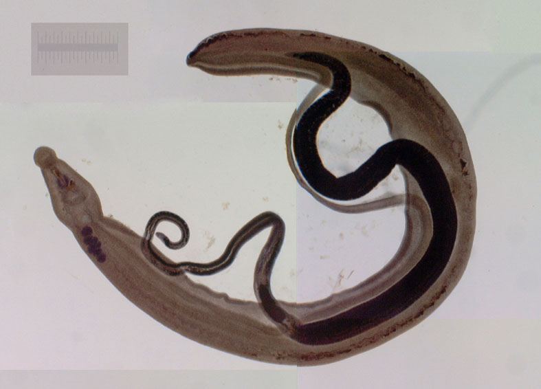 日本住血吸虫の鉄ヘマトキシレン染色標本。雄が雌を抱え込んだ状態で生活する。